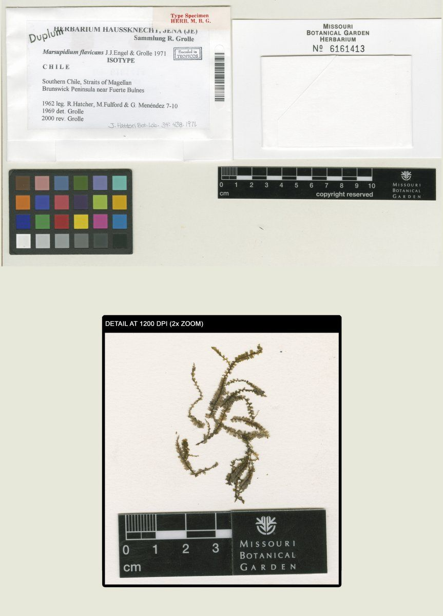 Marsupidium flavicans J.J. Engel & Grolle. Isotype 6161413